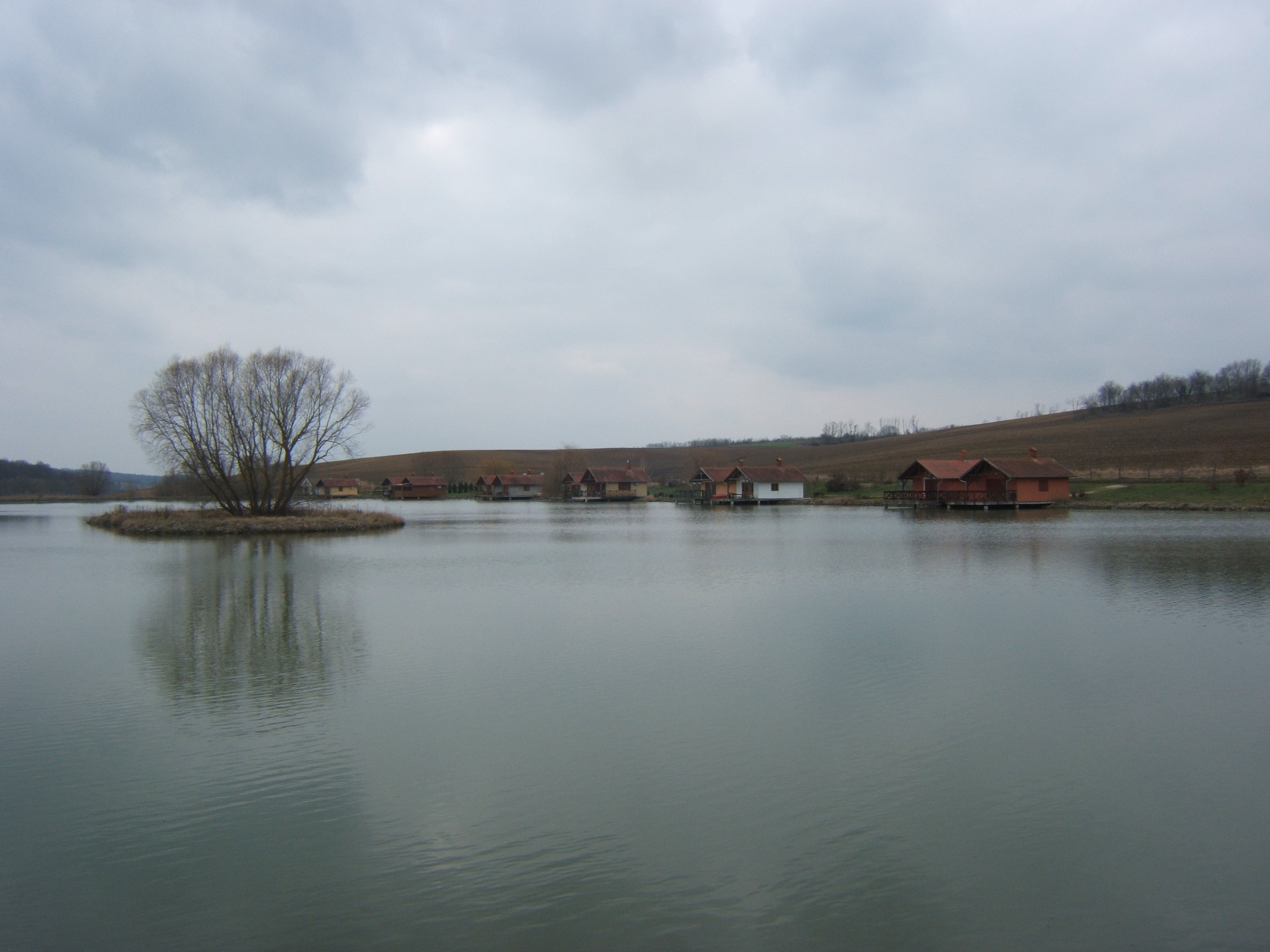 Polány, királyberki horgásztó